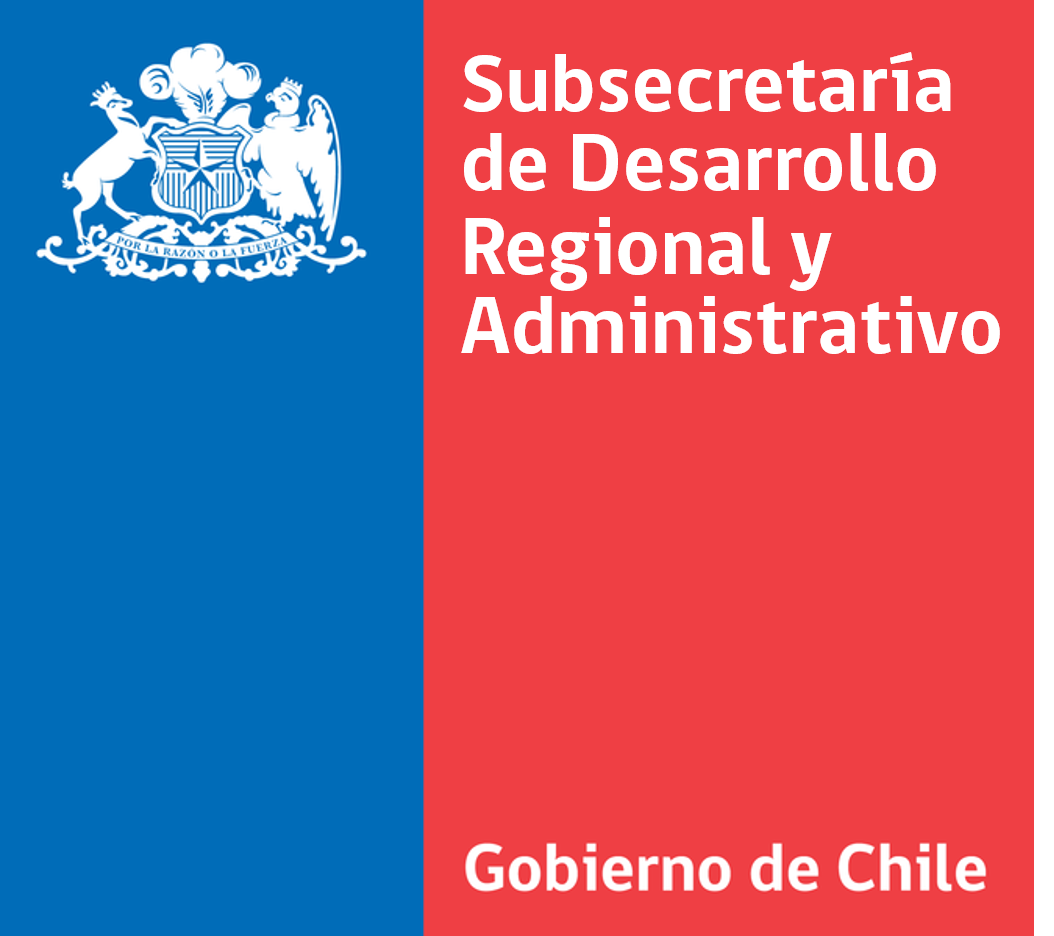 Logo Institucional de la Subsecretaría de Desarrollo Regional y Administrativo de Chile.